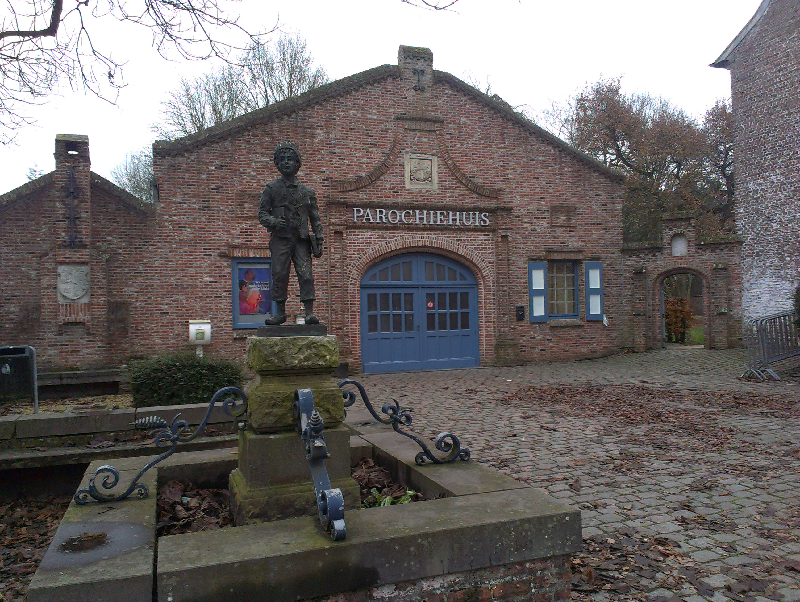 parochiehuis met standbeeld van Jan Frans Vonck op de voorgrond (centrum Baardegem)